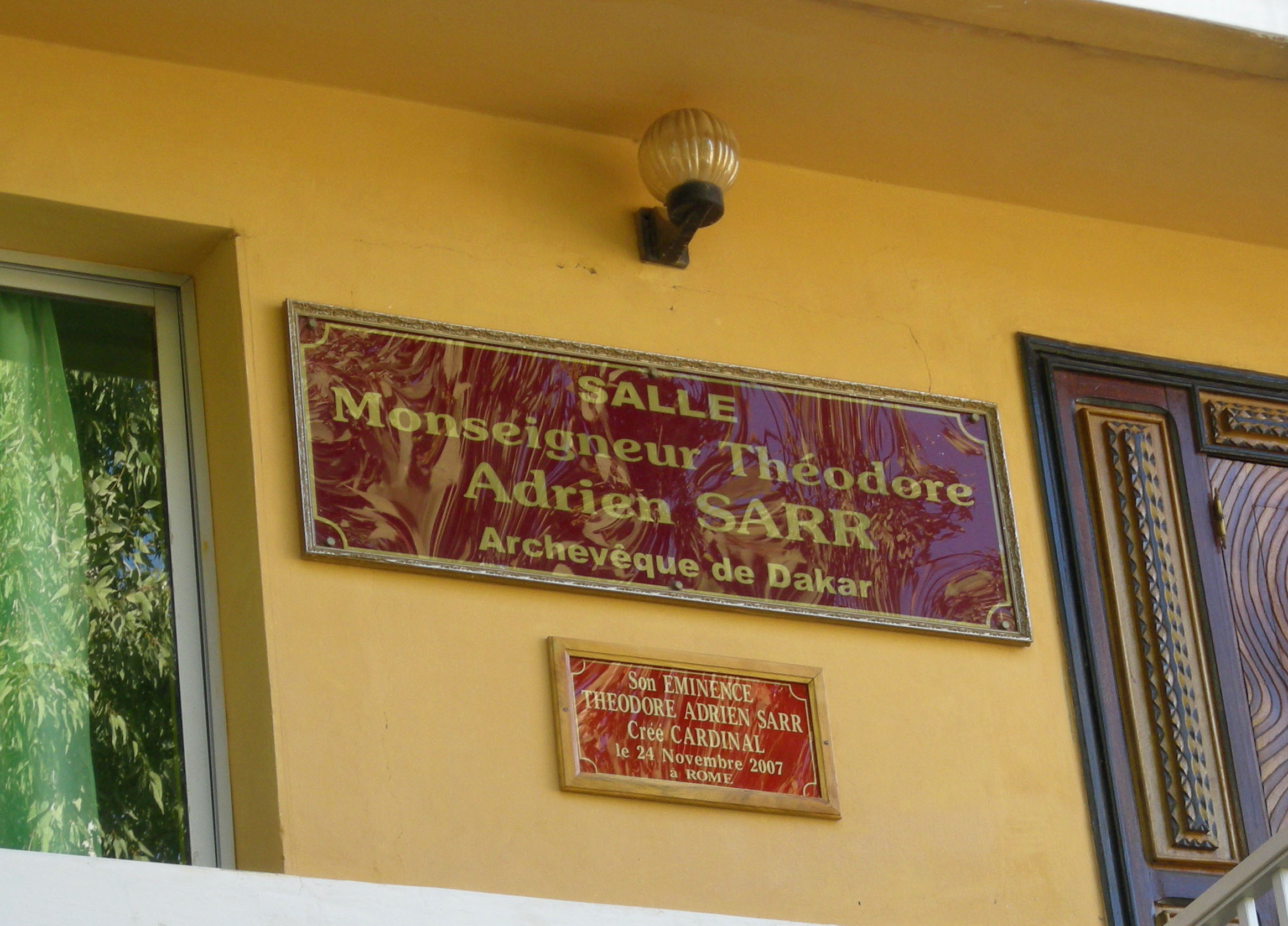 Salle dédiée au cardinal sénégalais Théodore-Adrien Sarr au Cours Sainte-Marie de Hann (Dakar, Sénégal)